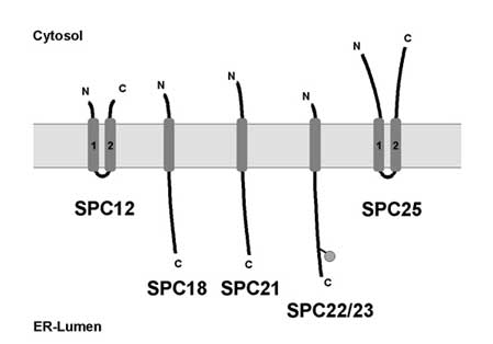 Schema Signalpeptidase